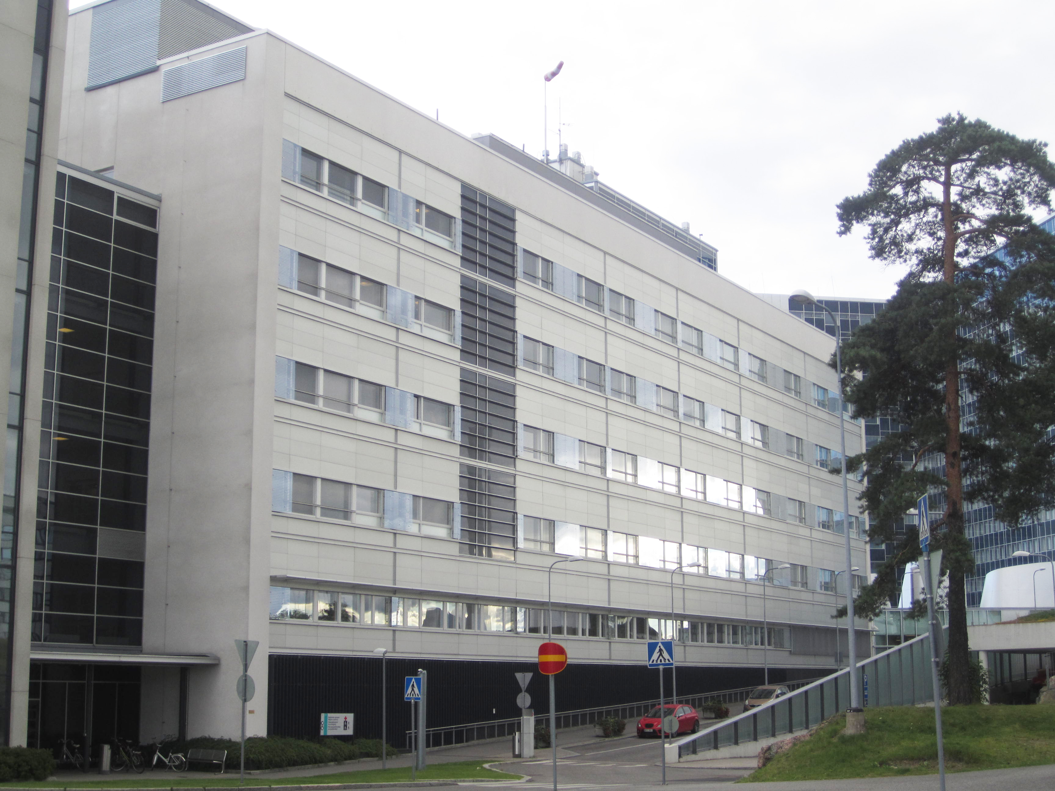 Meilahden kolmiosairaala Helsingissä.